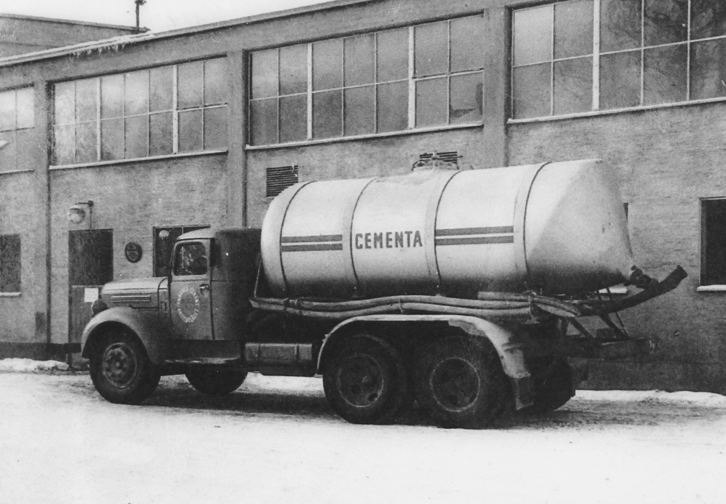 En cementbil från Cementa